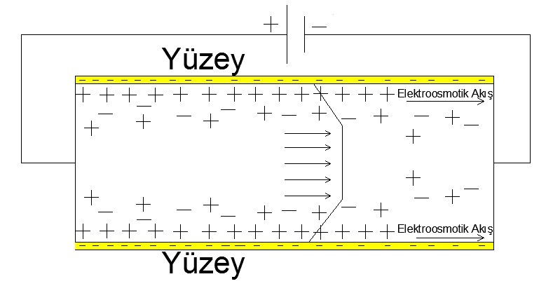 Elektro-osmotik akış, mikro-sistemlerdeki kanal içerisinde uygulanan elektrik alanın ve yüzey yüklerinin çözelti içerisindeki iyonlar ile etkileşimlerinin oluşturduğu akış olarak tanımlanır. Elektro-osmotik akışın temelini Coloumb kuvveti oluşturur. Yüzey yüklenmesinden dolayı akışkan içinde yüzeye yakın ve yüzey yüküne zıt yüklü iyonların yoğun bulunduğu bir tabaka oluşur. Bu tabakaya elektriksel çift tabaka denir. Akışkana elektrik alan uygulandığı zaman, elektriksel çift tabakadaki yüklü iyonlar Coloumb kuvvetinin etkisi ile harekete geçer. Böylece elektro-osmotik akış oluşur. Kanal duvarının yüklenmesi çözeltinin pH değeri ve yüzeyin kimyasal yapısı ile ayarlanır. Kılcal kanalın yüzeyinin yüklenmesinden kaynaklanan etkiyi zeta potansiyeli karakterize eder. Yüzeyin yük durumu akış için önemli olduğundan yüzey yükünün sabit tutulması için çözeltinin pH değerinin aynı kalması önemlidir. Elektro osmotik alış hızı u=μ*E şeklinde tanımlanabilir.Burada μ elektro osmotik mobilite, E elektrik alandır.Elektro osmotik mobilite aşağıdaki formülle verilir. μ=ζ *ɛ/η Burada, ɛ dielektrik sabiti, ζ zeta potansiyeli ve η viskozitedir.